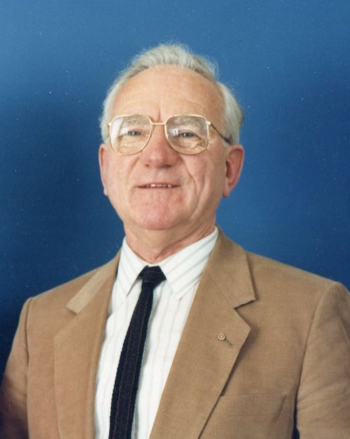 Ger van Iersel